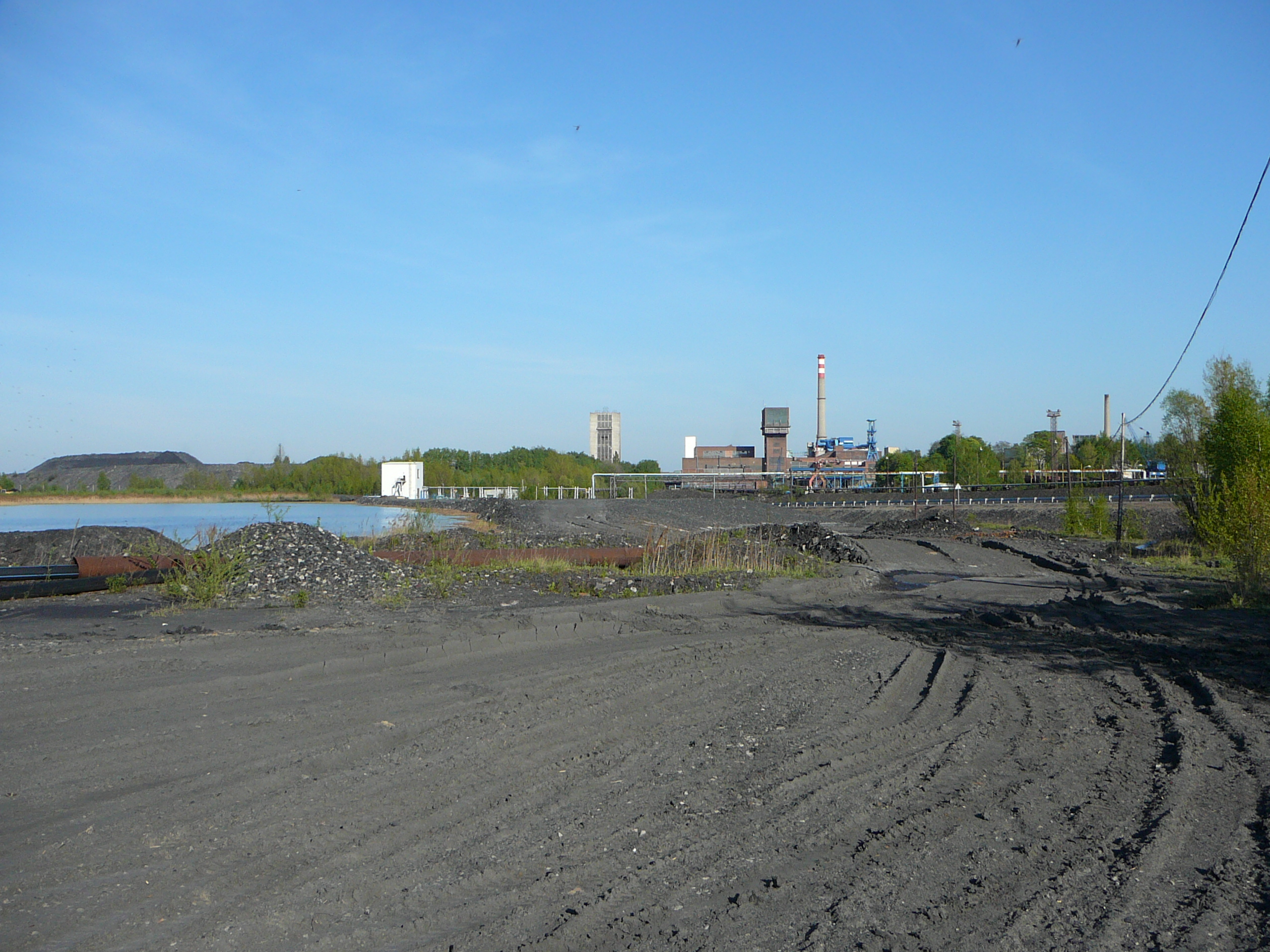 Krajina kolem dolu Jan Karel